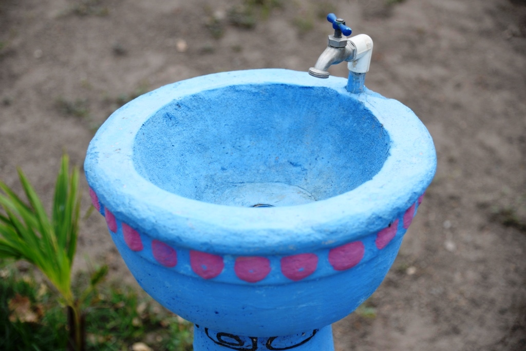 Un fuente de agua potable en un parque pequeño en El Jicaral, Nicaragua.